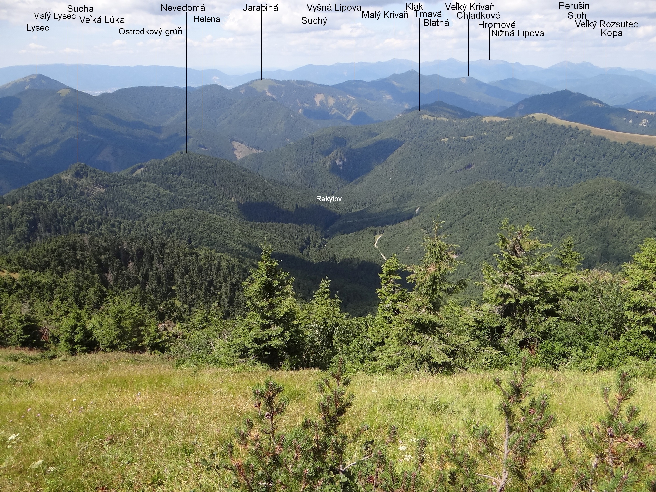 View from Rakytov